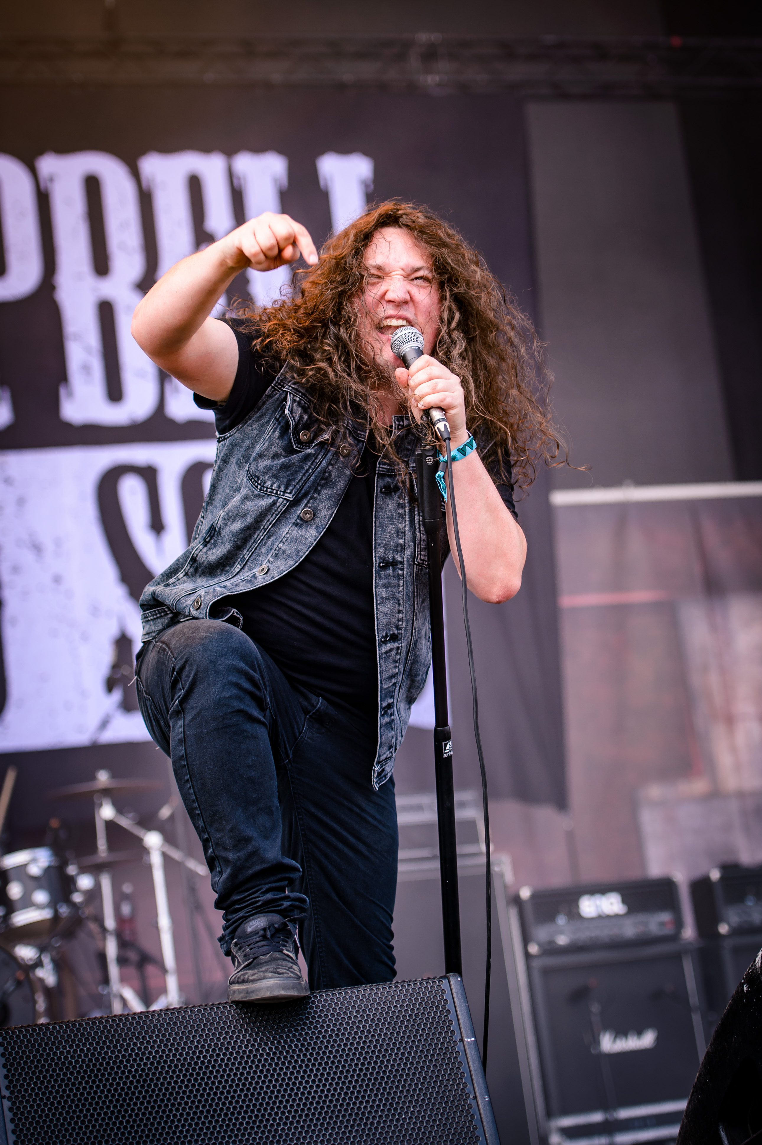 'Summer Breeze Festival 2018; Dinkelsbühl': 'Phil Campbell and the Bastard Sons'